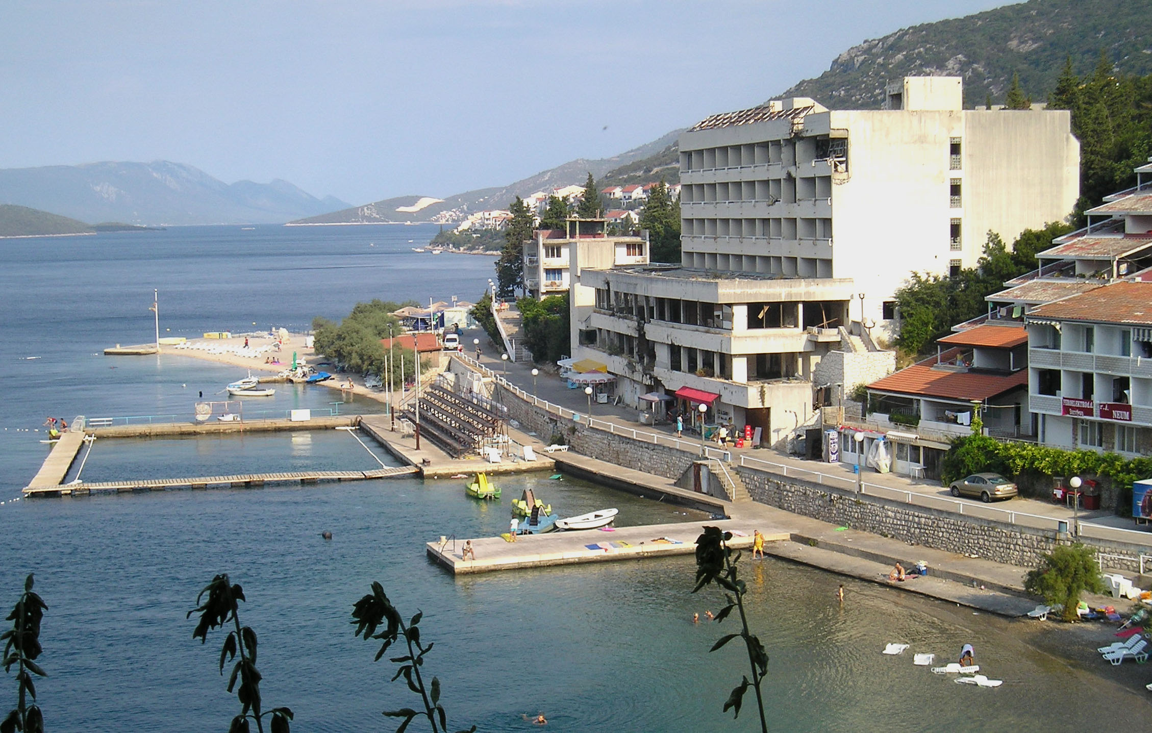 Neum, Bosnia&Hercegowina